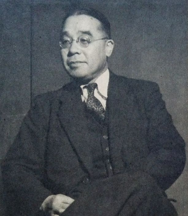 相羽有（東京航空輸送社創設者）